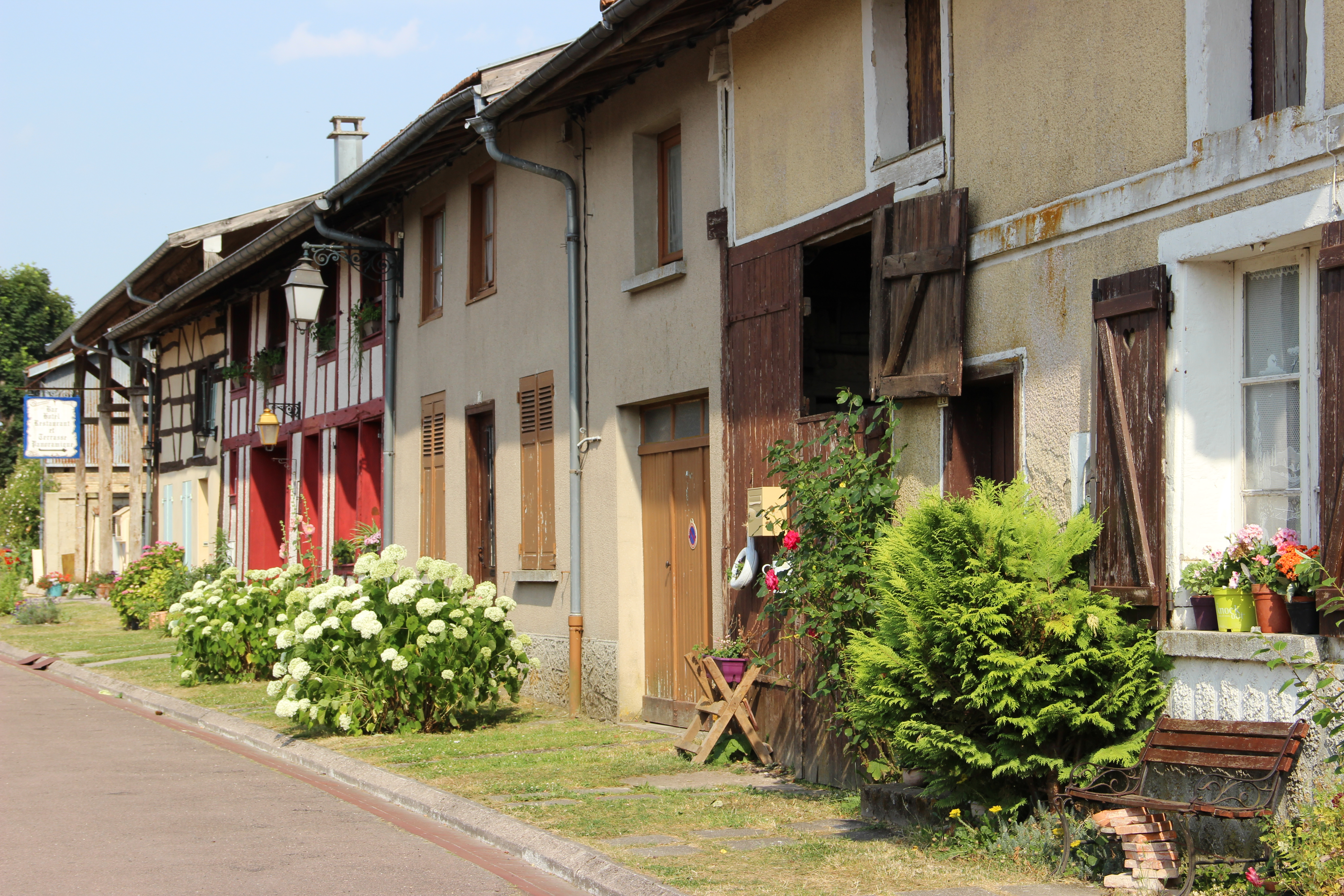 La Grande Rue